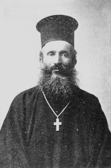 Stathi Melani (1858-1917)